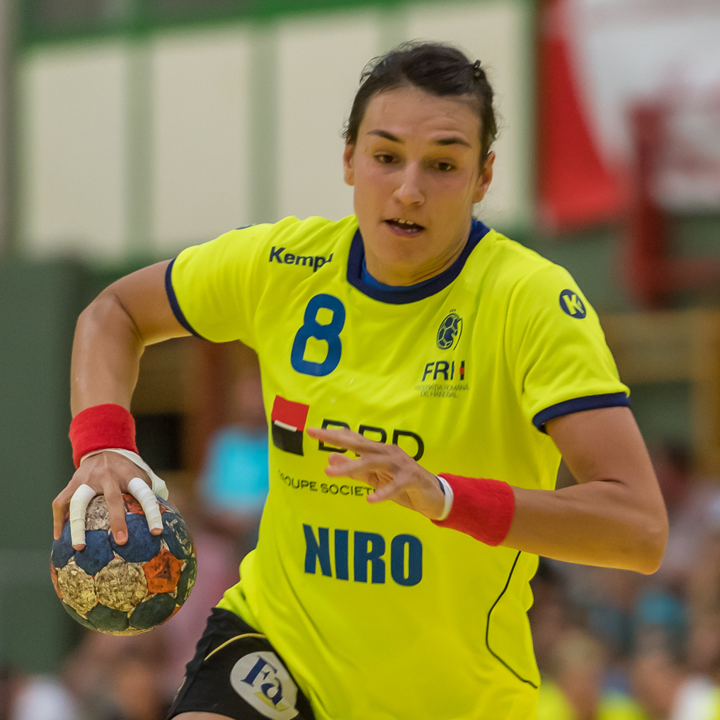 Damenhandball WM-Qualifikation Playoff Österreich vs Rumänien am 13. Juni 2017 in Stockerau. Bild zeigt Cristina Georgiana Neagu (ROU).